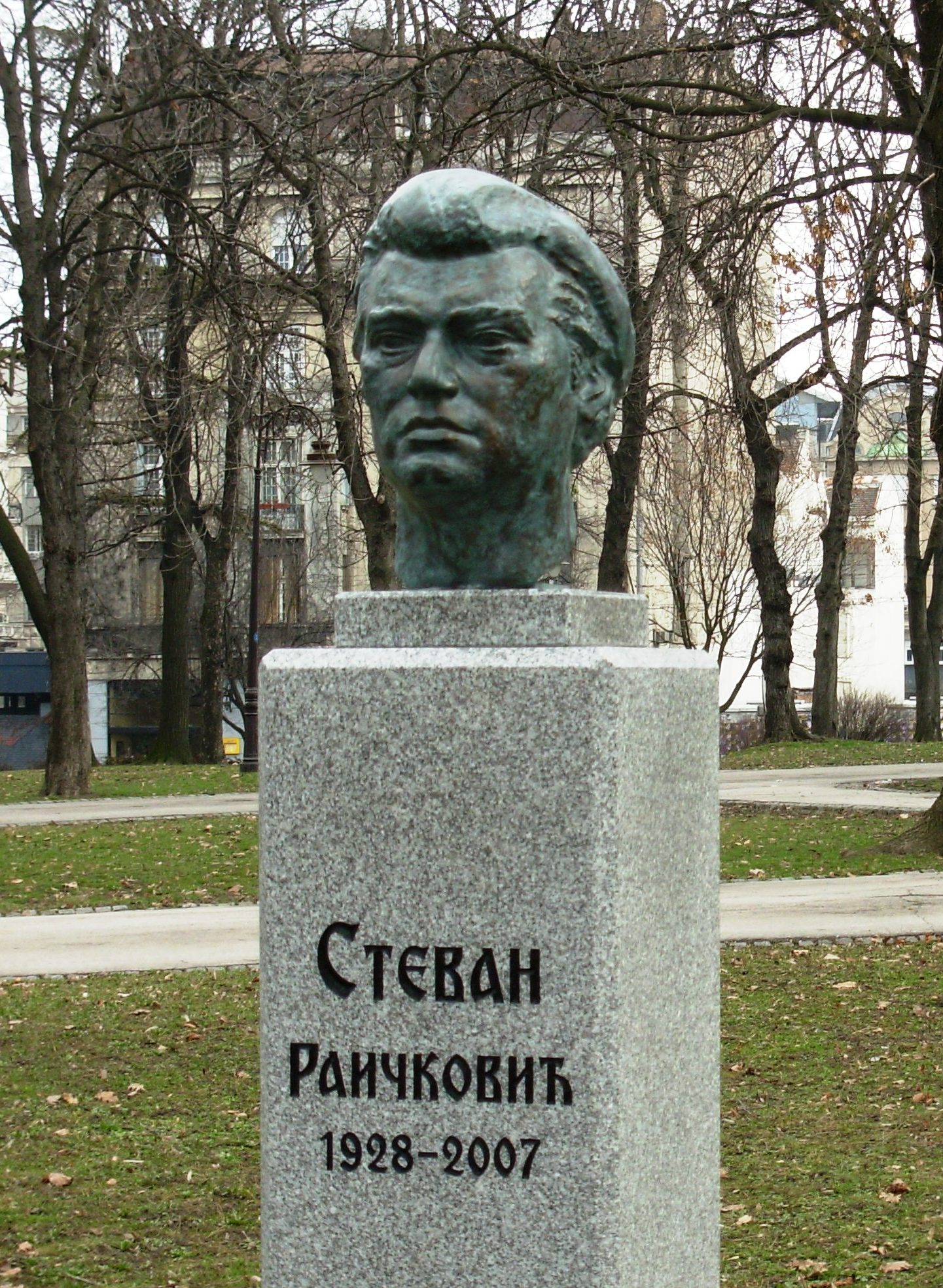 Srevan Raičković, bista na Kalimegdanu, Beograd. Slikao Goldfinger